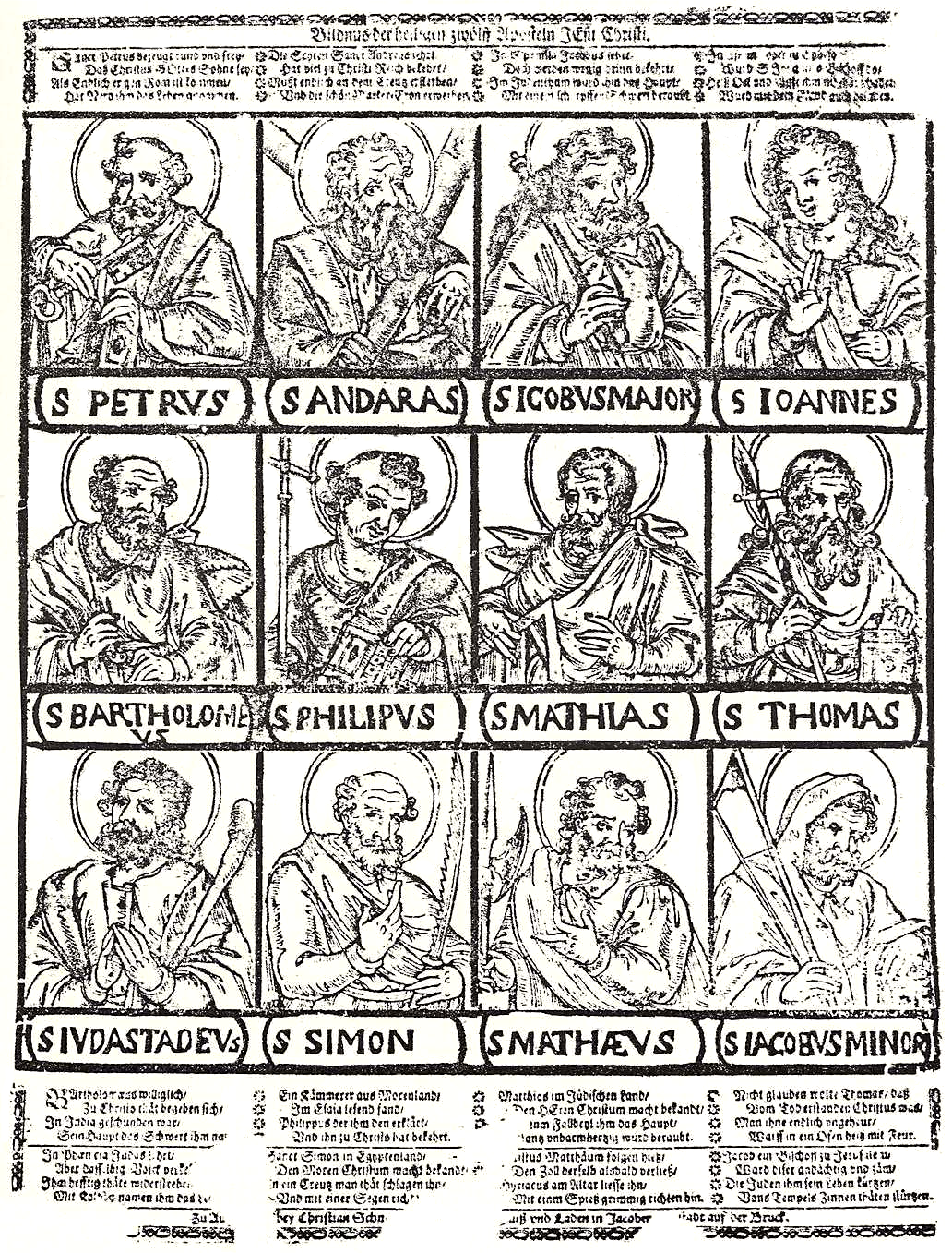 Die zwölf Apostel, Holzschnitt von Christian Schmid, 17. Jahrhundert, Standort: Kunstmuseum in Augsburg